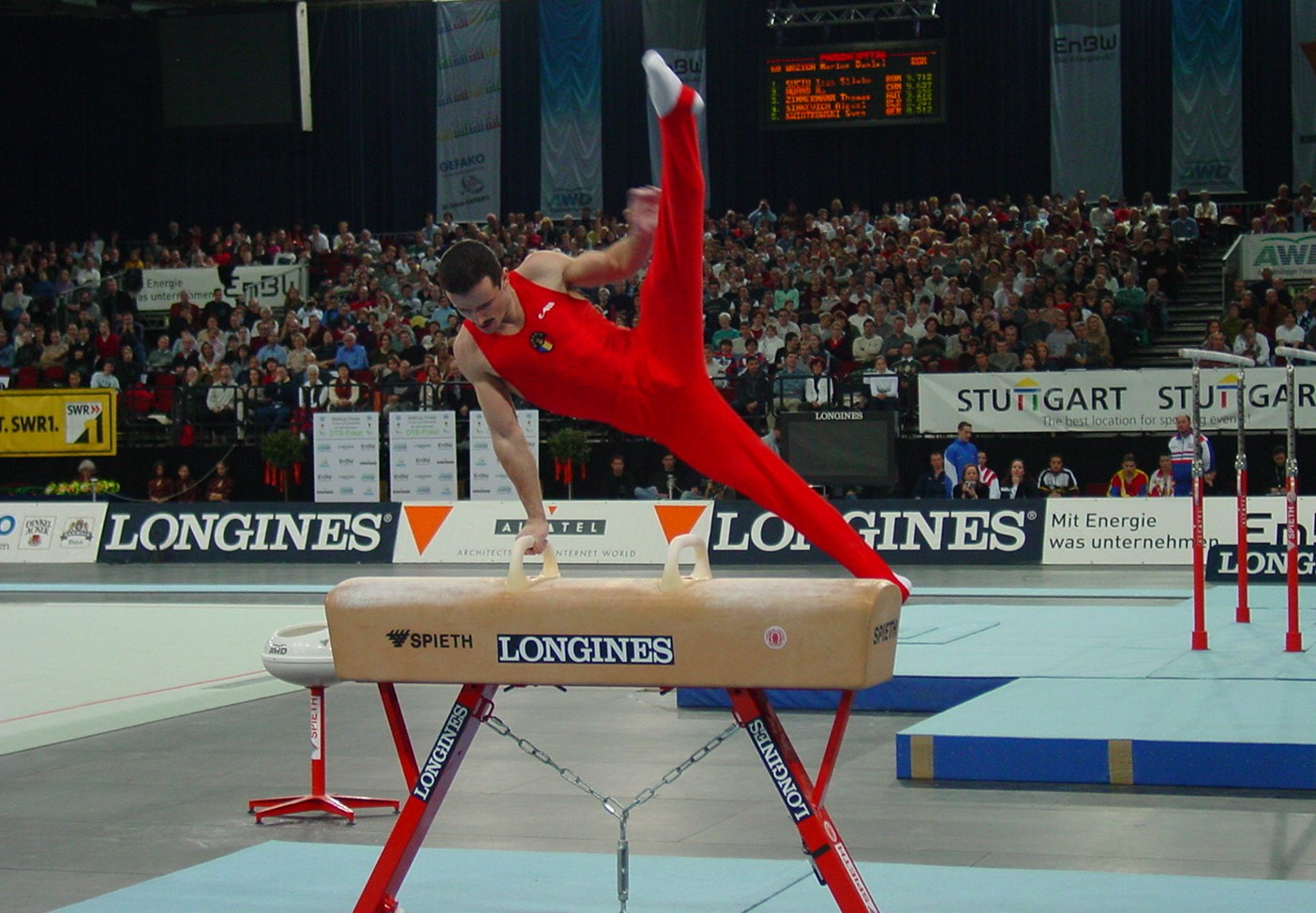 Olympiasieger Marius Urzica beim Weltcup-Finale 2002 in Stuttgart.